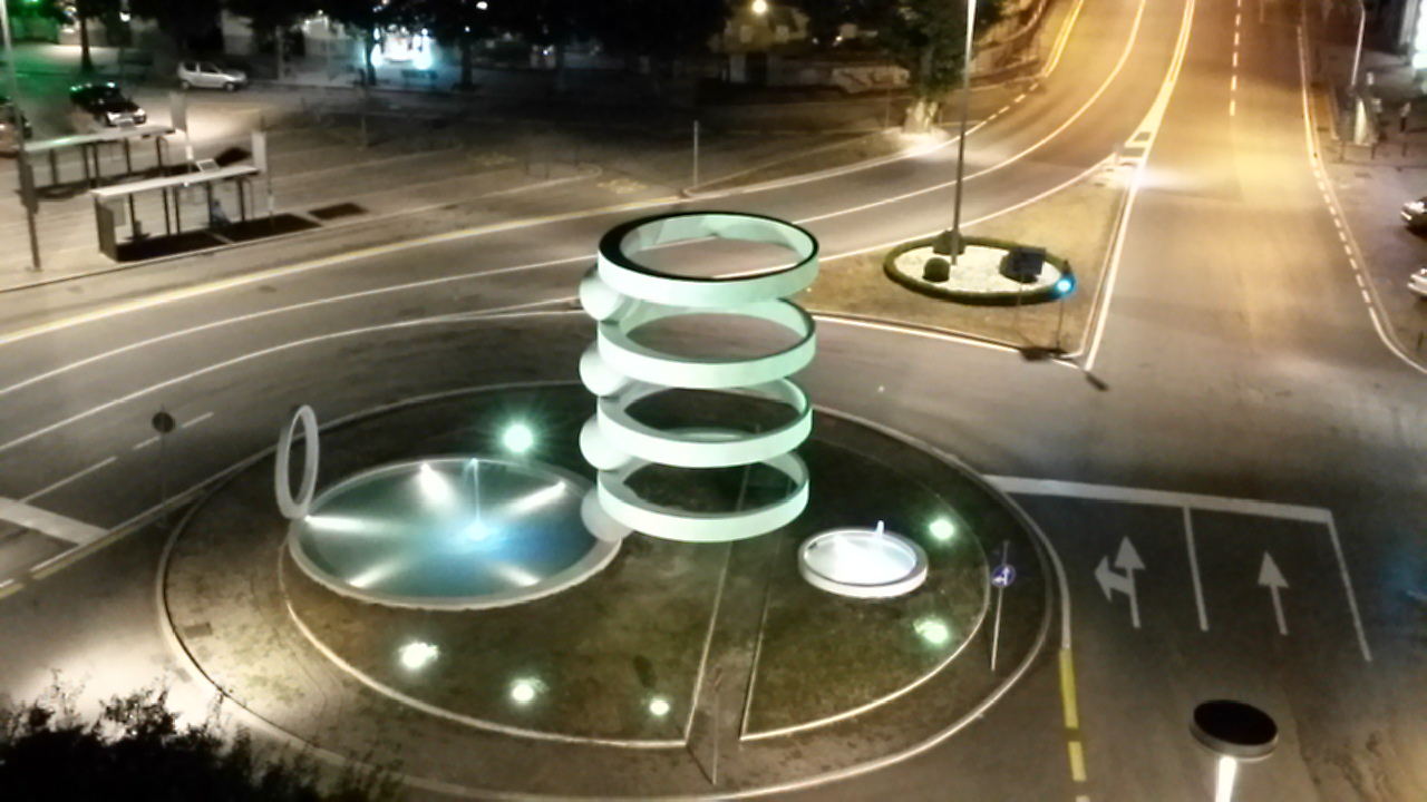 Fontana di Camerlata This is a photo of a monument which is part of cultural heritage of Italy.